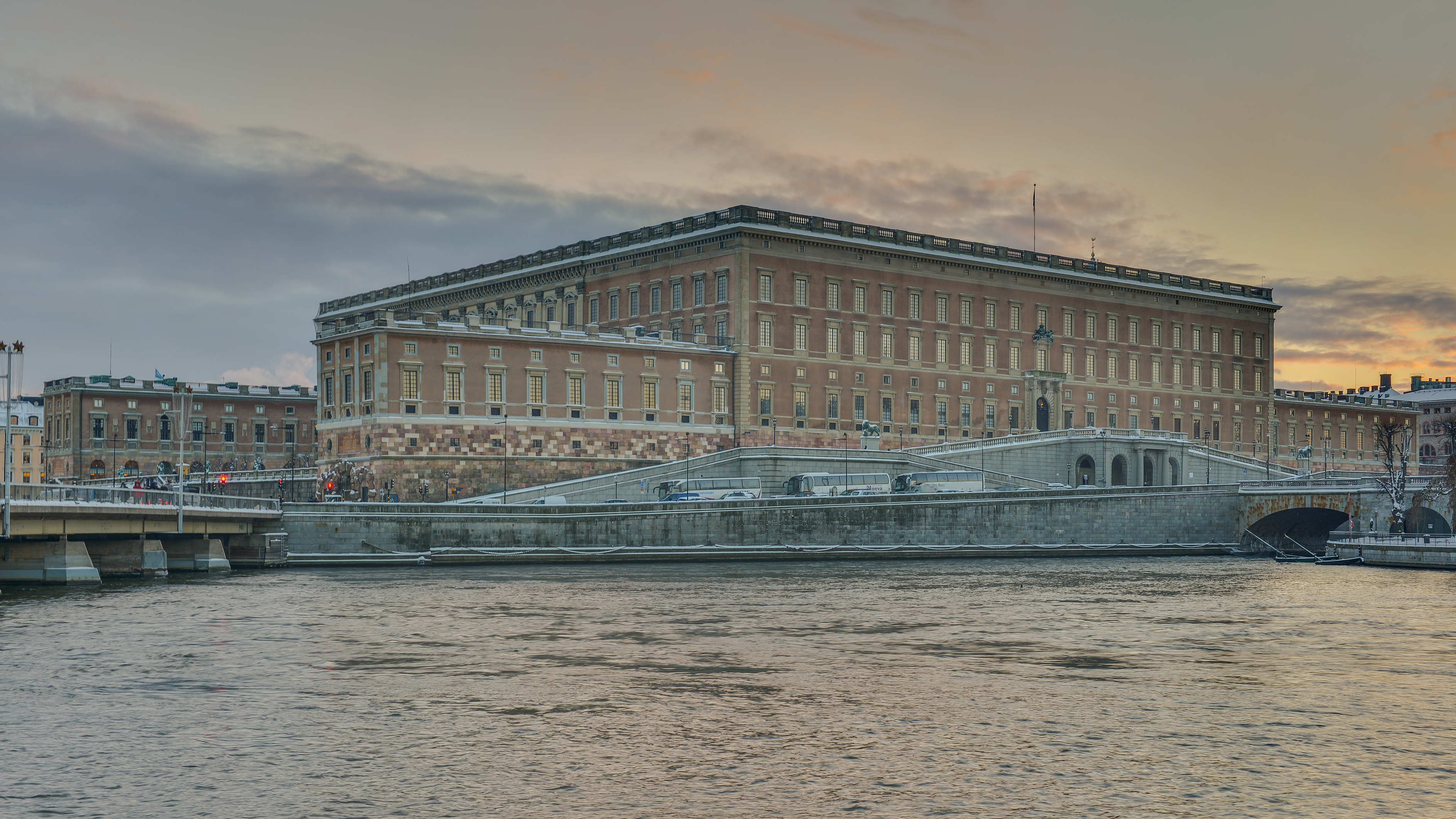 Royal Palace, Stockholm.